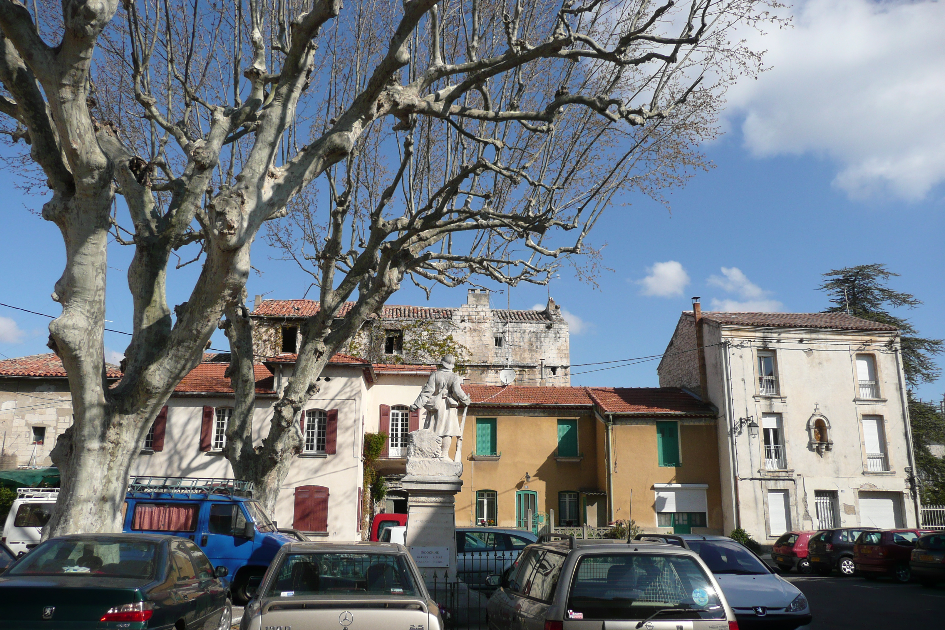 Place à Cabannes (Bouches-du-Rhône, France)